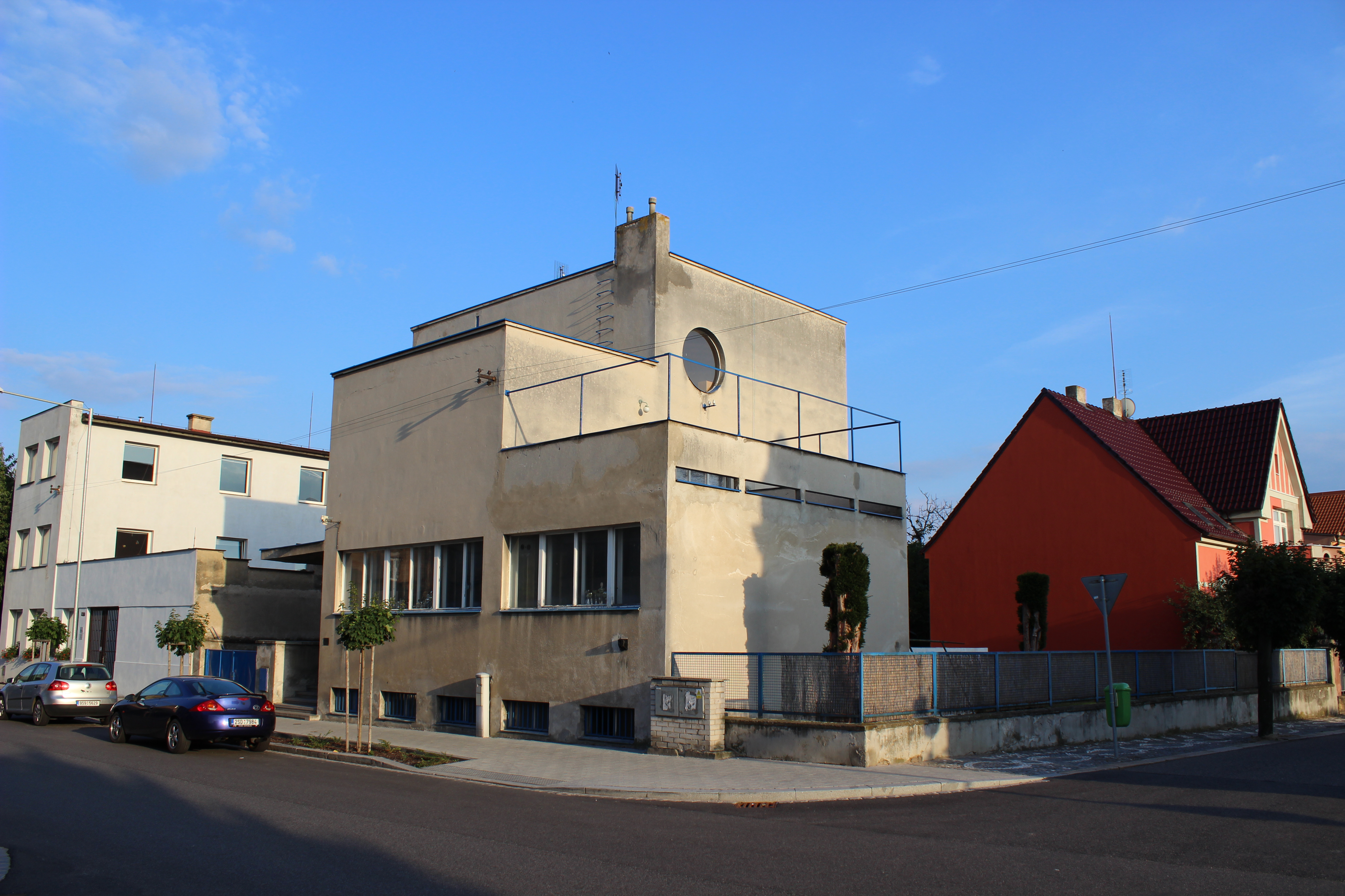 Löwitova vila v Nymburce (Komenského 1427/23).